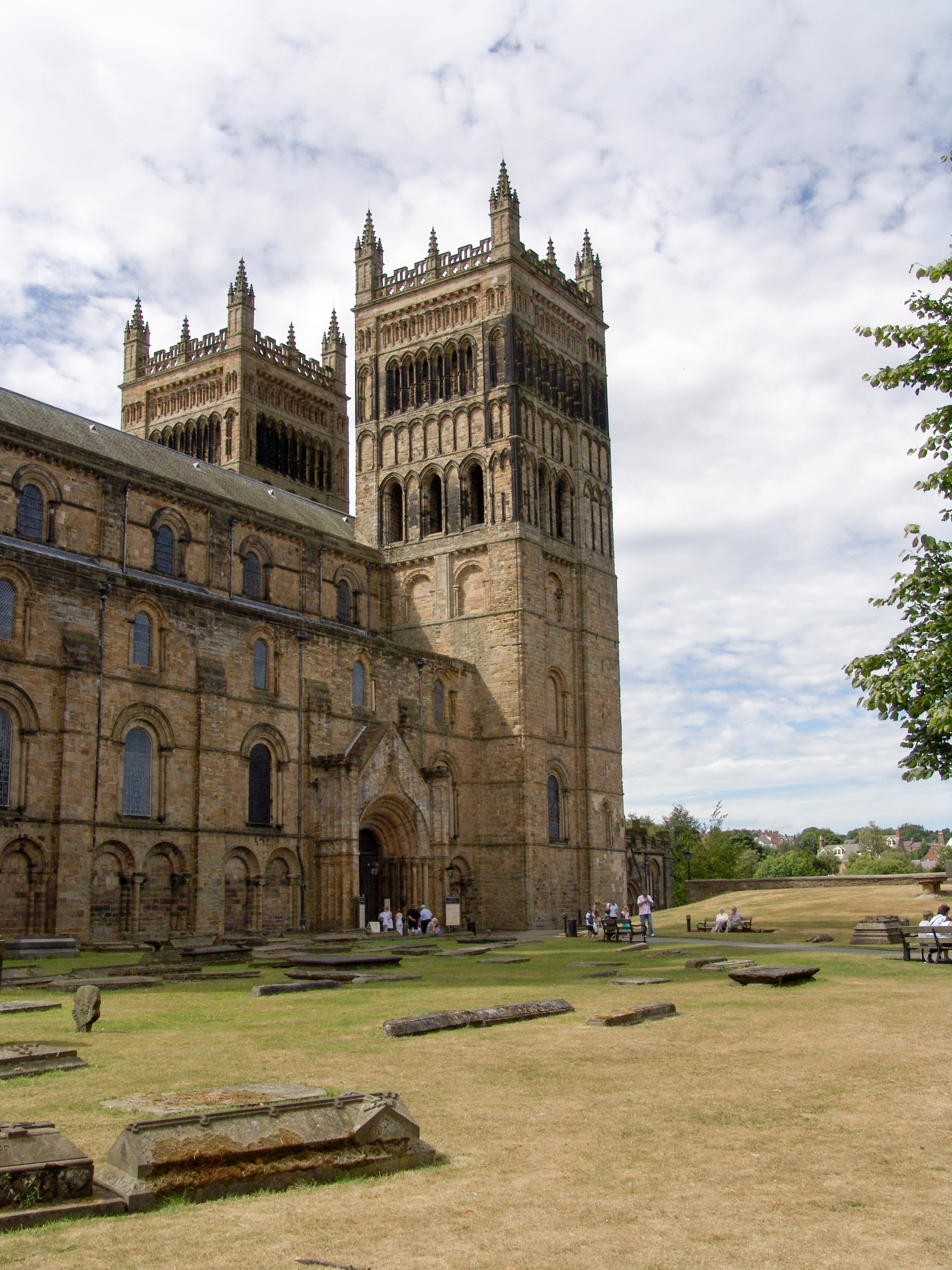 Durham Cathedral